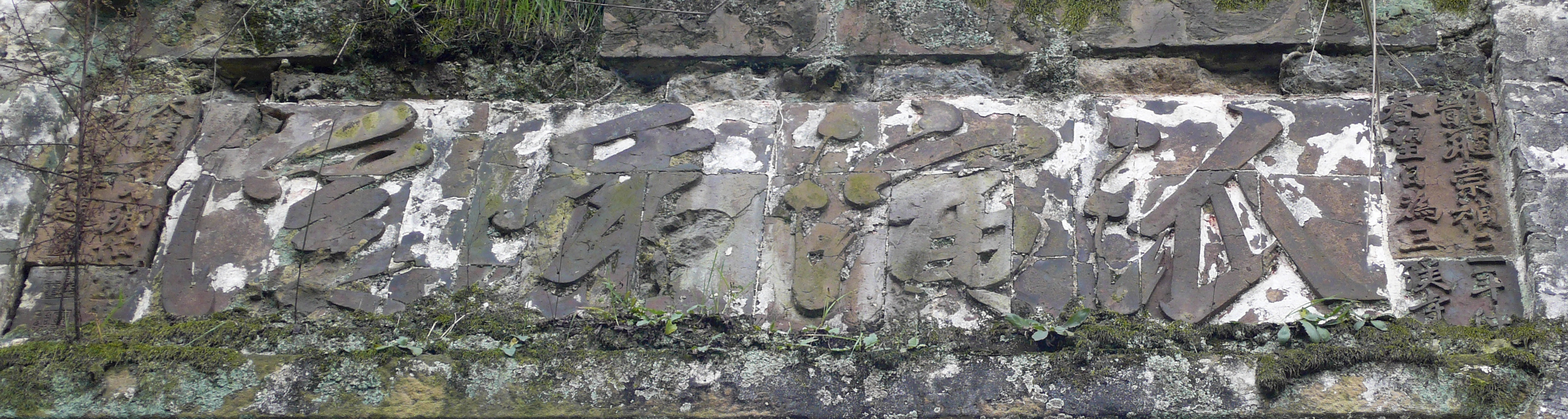 中文（台灣）: 崇禎二年歐陽調律題合州三溪寺